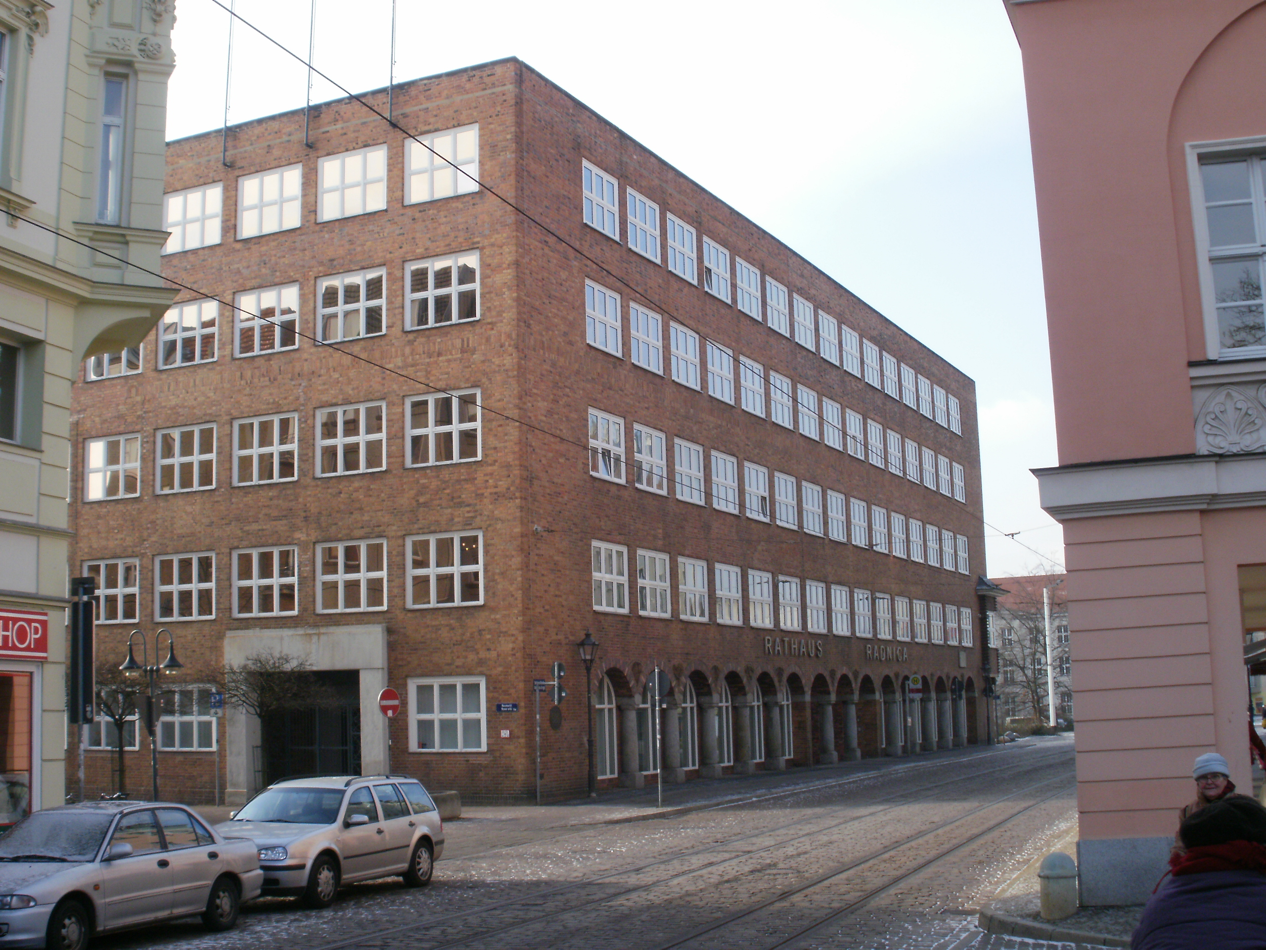 Neues Rathaus der Stadt Cottbus, Neumarkt 5